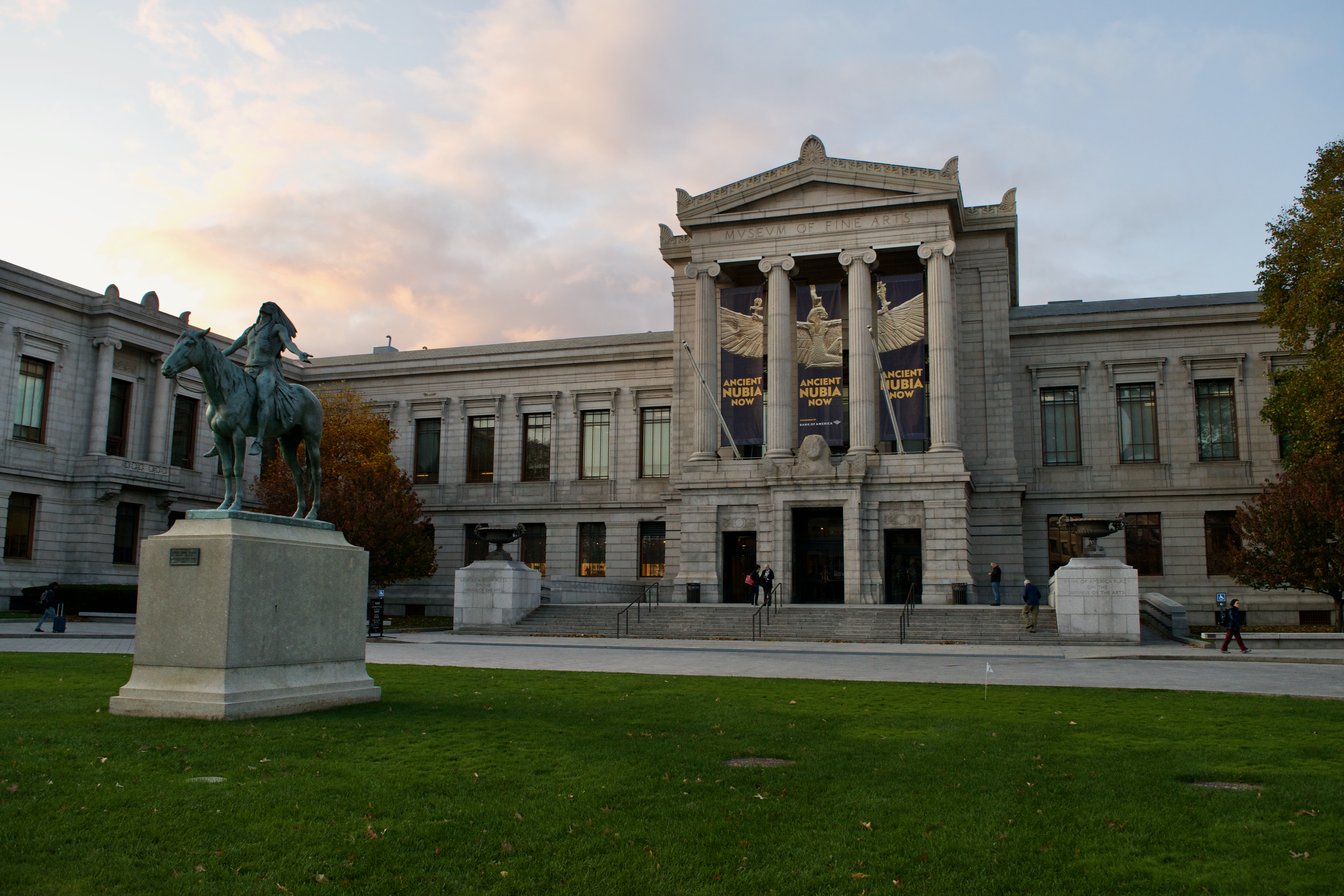 Boston Museum of Fine Artes